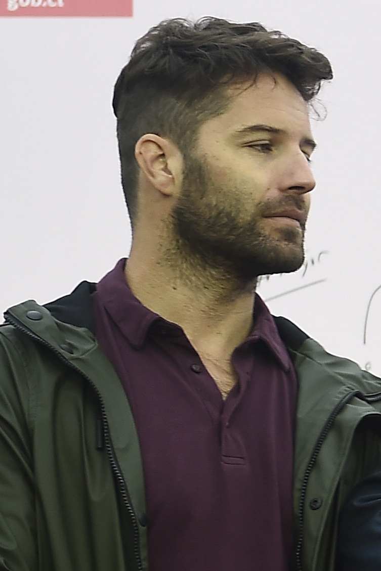 Gobierno de Chile